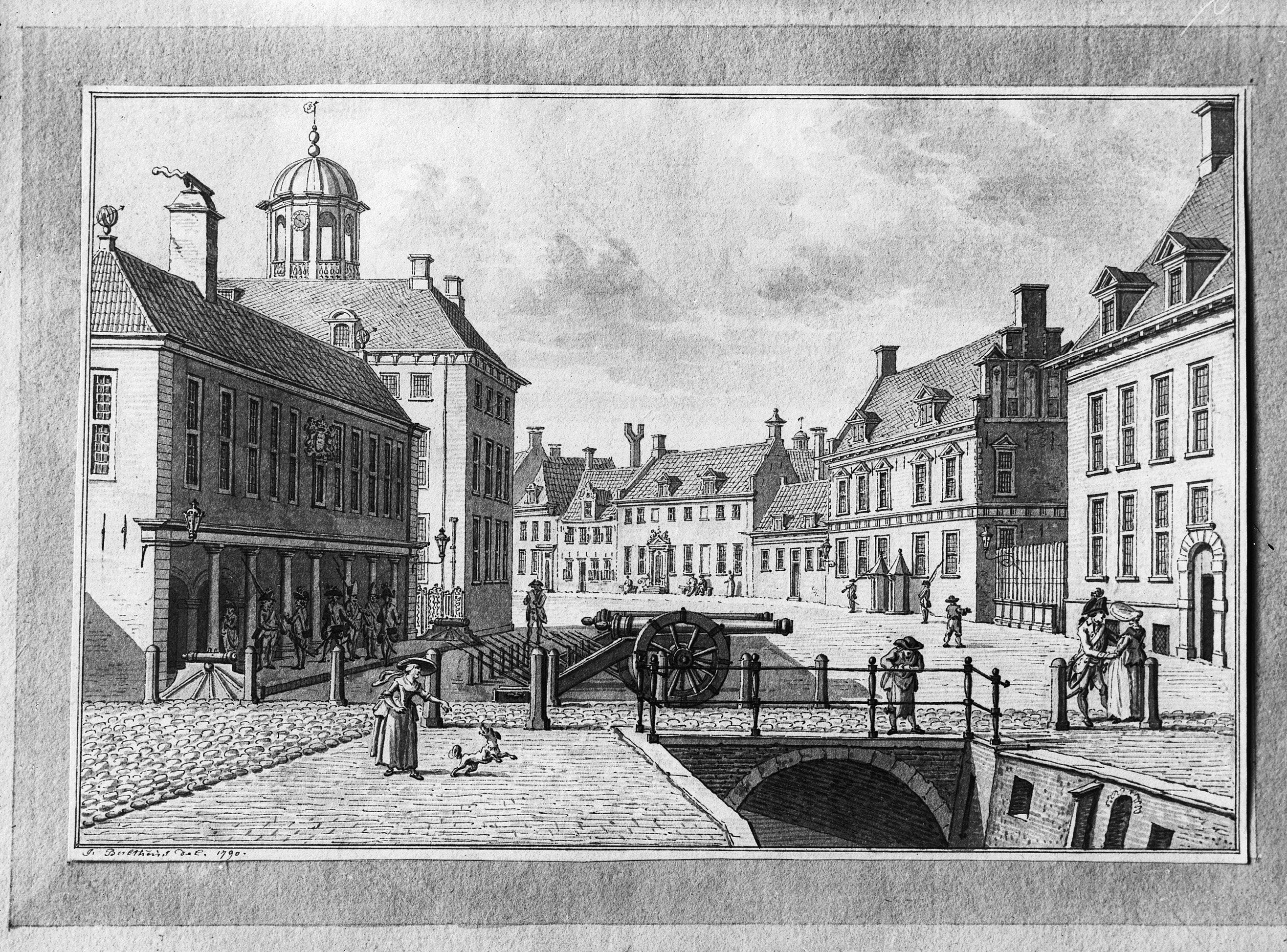 Raadhuis: stadhuis en Prinsessehof tekening J.Bulthuis 1790